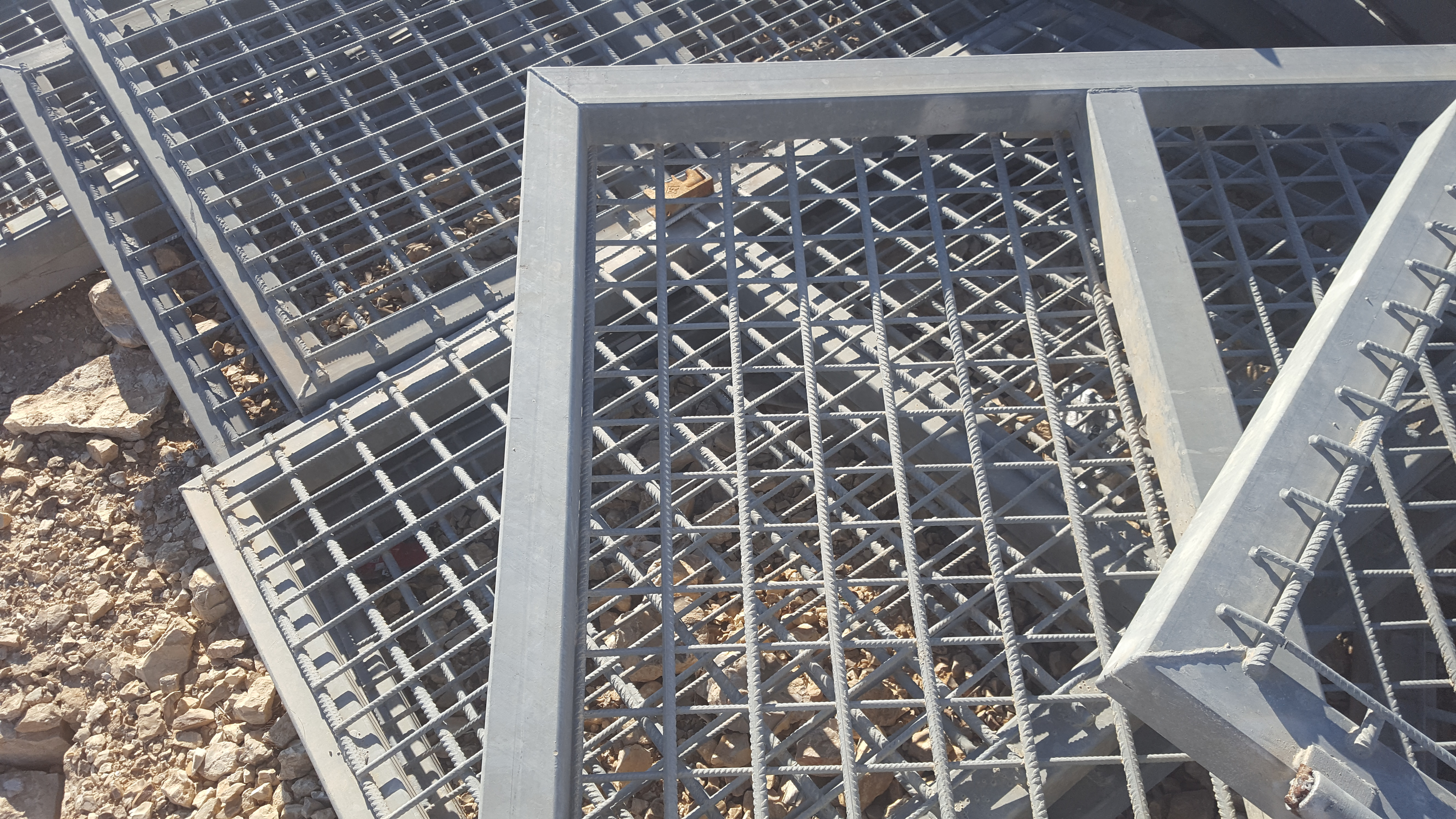 תקריב מבנה גדר המערכת בגבול מצרים